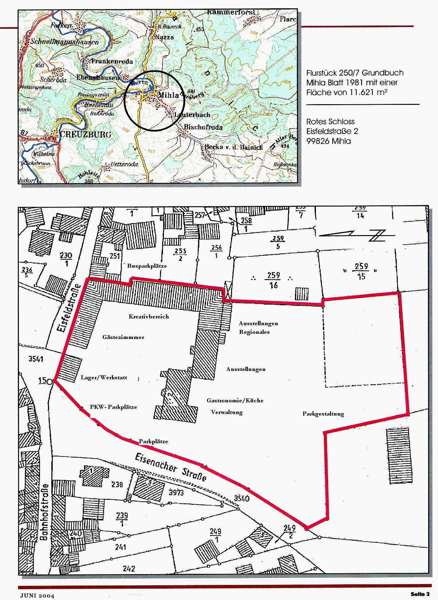 Flurplan Rotes Schloss Mihla